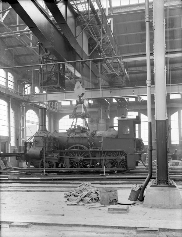 nterieur van stelplaats IV van de Centrale Werkplaats van de H.S.M. te Haarlem: hal 24, tijdens het beproeven van één van de twee loopkranen met behulp van de stoomlocomotief nr. 4 "Diana" (serie 1-15, 26-30) van de H.S.M.